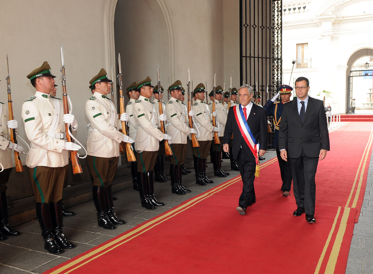 El Te Deum Ecuménico de Acción de Gracias se llevó a cabo en la Catedral Metropolitana durante la mañana del sábado 18 de septiembre. Esta ceremonia fue oficiada por el cardenal de Santiago, monseñor Francisco Javier Errázuriz, y contó con la presencia del Presidente de la República, Sebastián Piñera, y su esposa, Cecilia Morel. Además del Jefe de Estado, ministros y numerosas autoridades del país, asistieron al Te Deum distintas delegaciones extranjeras y el Presidente de Bolivia, Evo Morales, y su par de Paraguay, Fernando Lugo. El Te Deum Ecuménico de Acción de Gracias se llevó a cabo en la Catedral Metropolitana durante la mañana del sábado 18 de septiembre. Esta ceremonia fue oficiada por el cardenal de Santiago, monseñor Francisco Javier Errázuriz, y contó con la presencia del Presidente de la República, Sebastián Piñera, y su esposa, Cecilia Morel. Además del Jefe de Estado, ministros y numerosas autoridades del país, asistieron al Te Deum distintas delegaciones extranjeras y el Presidente de Bolivia, Evo Morales, y su par de Paraguay, Fernando Lugo.